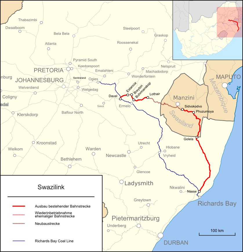 Streckenkarte des Swazilink